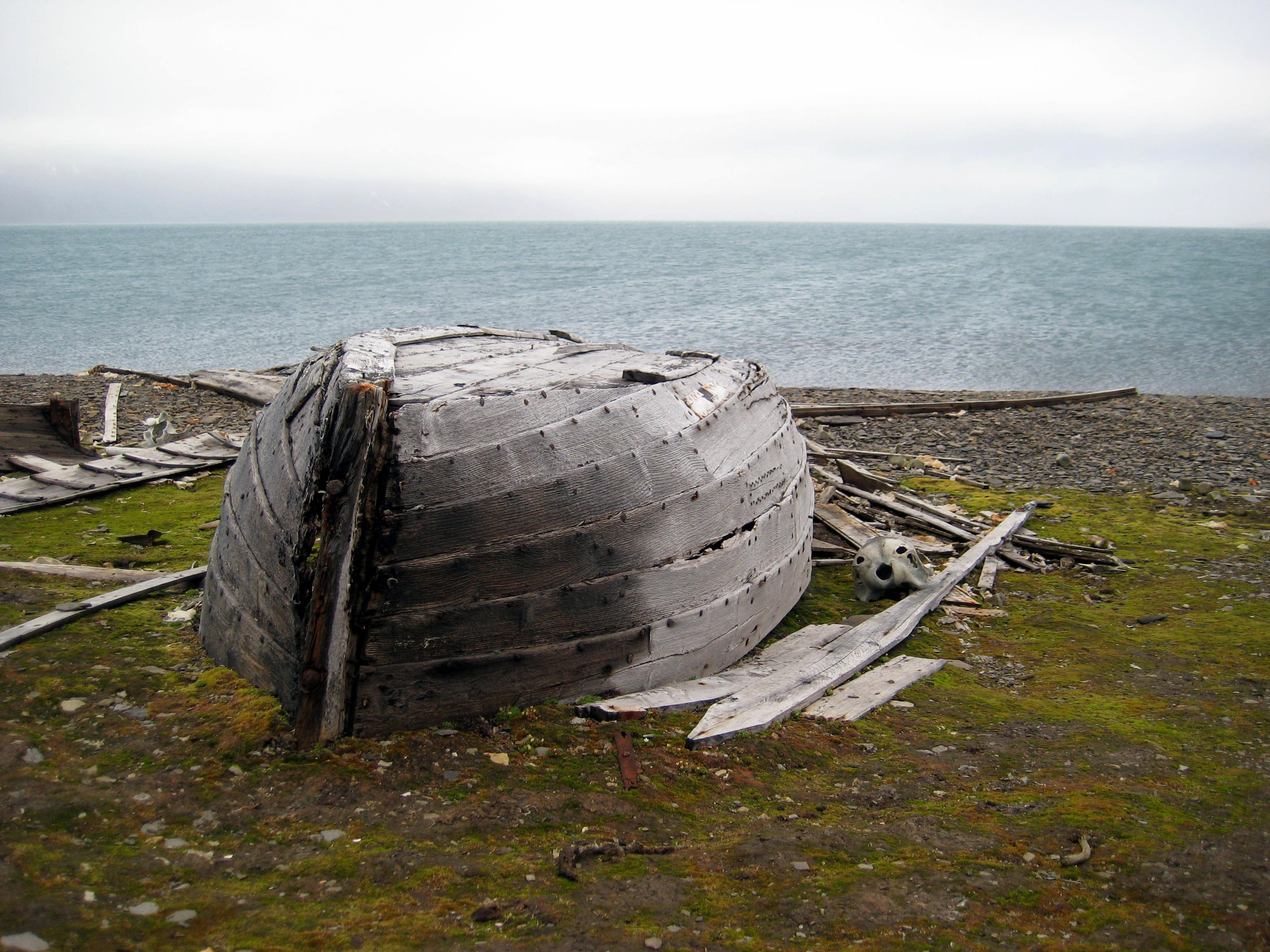 Boat at cabin Bamsebu at Van Keulenfjorden.